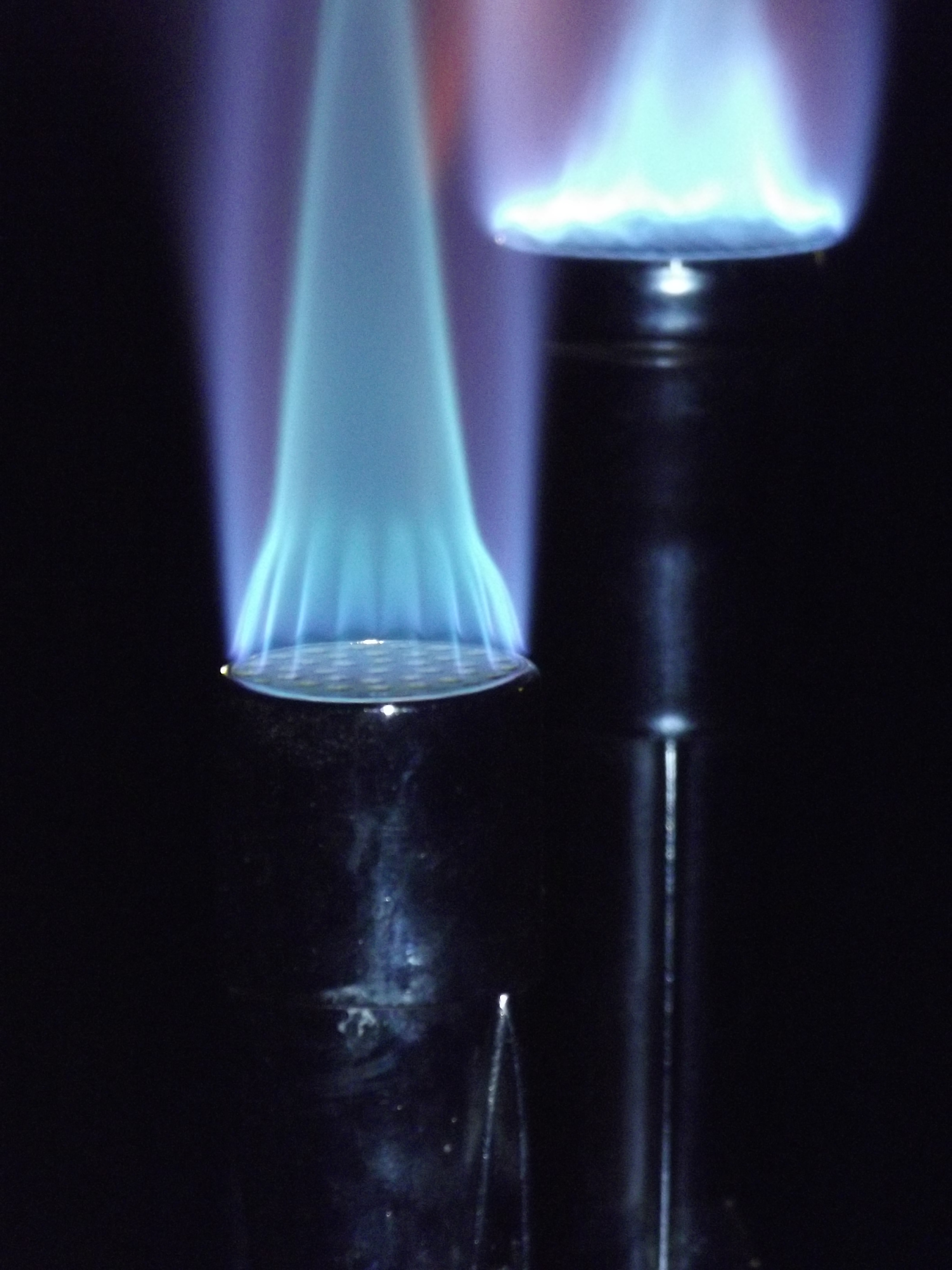 Meker-Fisher burners.